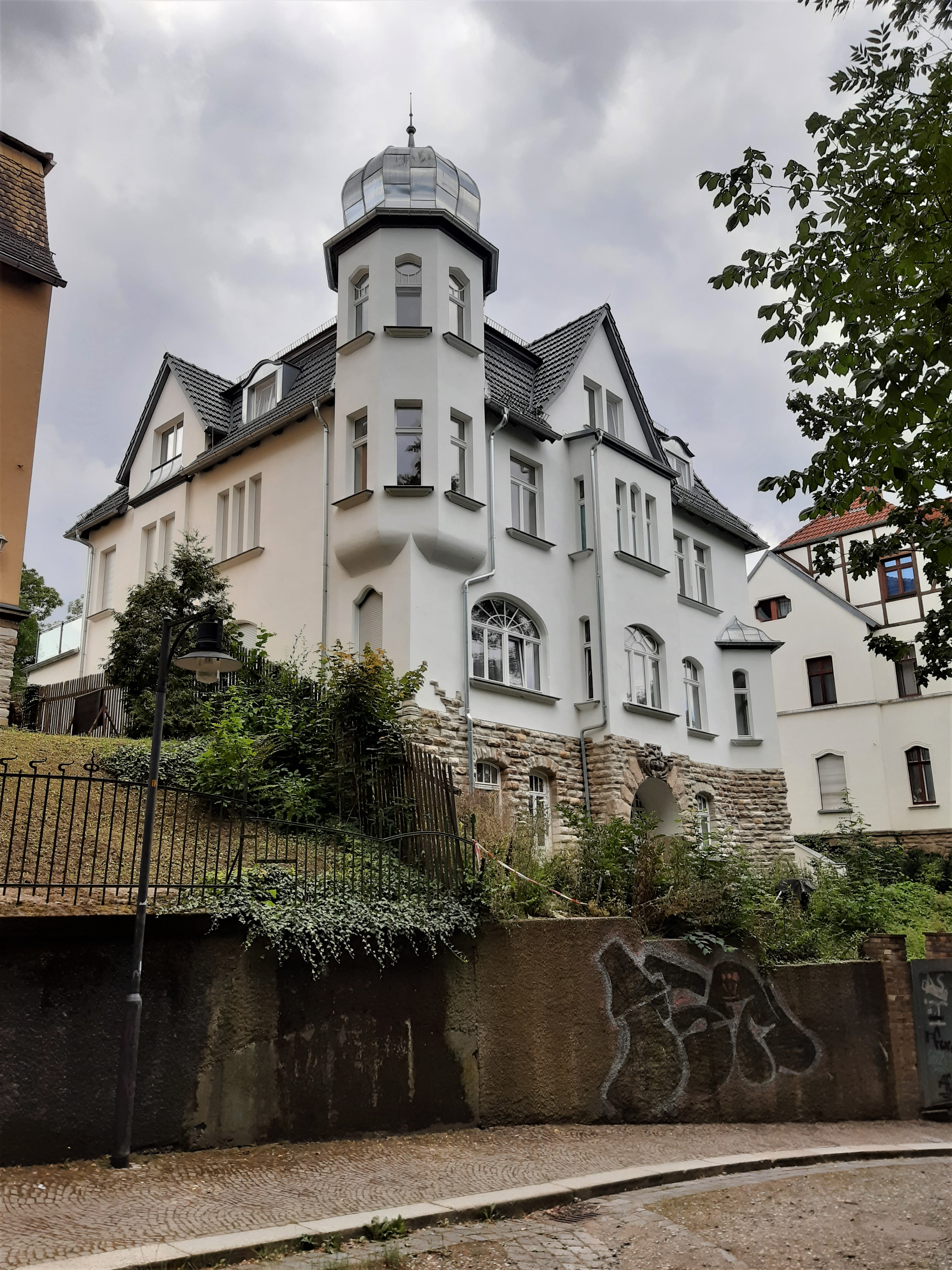 Villa Am Stadtpark 4, Weißenfels